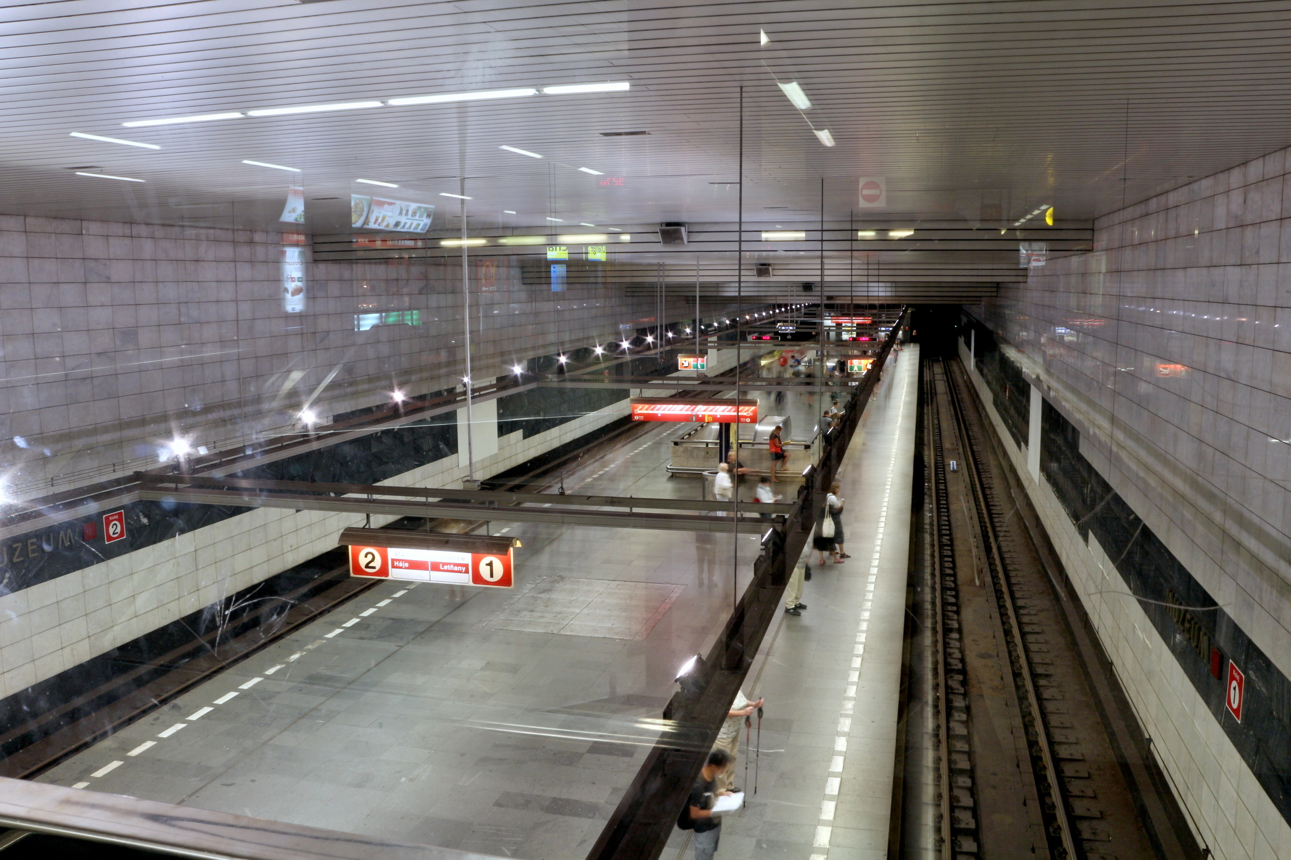 Trasa C, stanice Muzeum